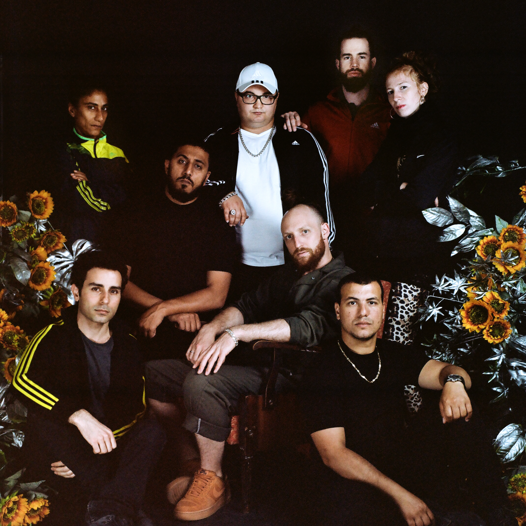 בתמונה חברי ההרכב סיסטם עאלי: מוחמד מוגרבי, יוהנה ריטמולר, סתיו ליפיץ, אנבר סייטיברגימוב, מוחמד אגואני, סמירה סרייה, רועי חסון, נטע וינר